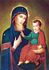 Nuestra Señora de Consolación